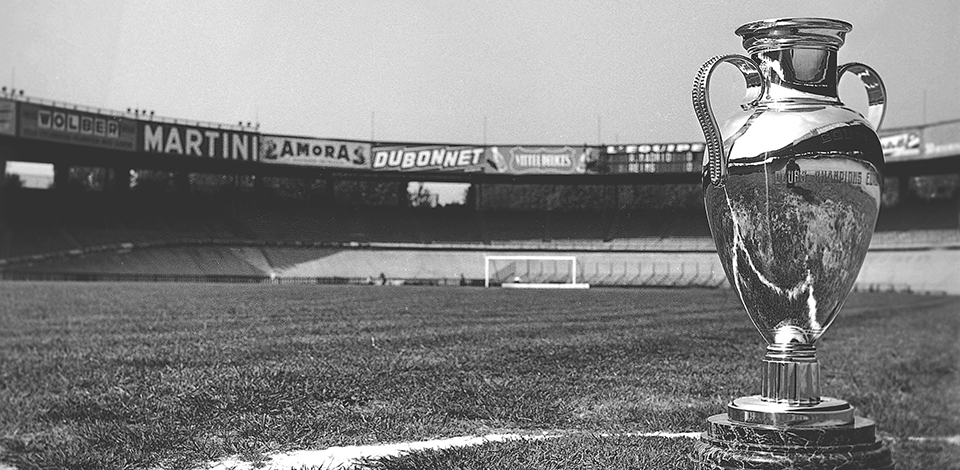 Présentation de la première Coupe d'Europe des Clubs Champions au Parc des Princes à Paris le 13 juin 1956.